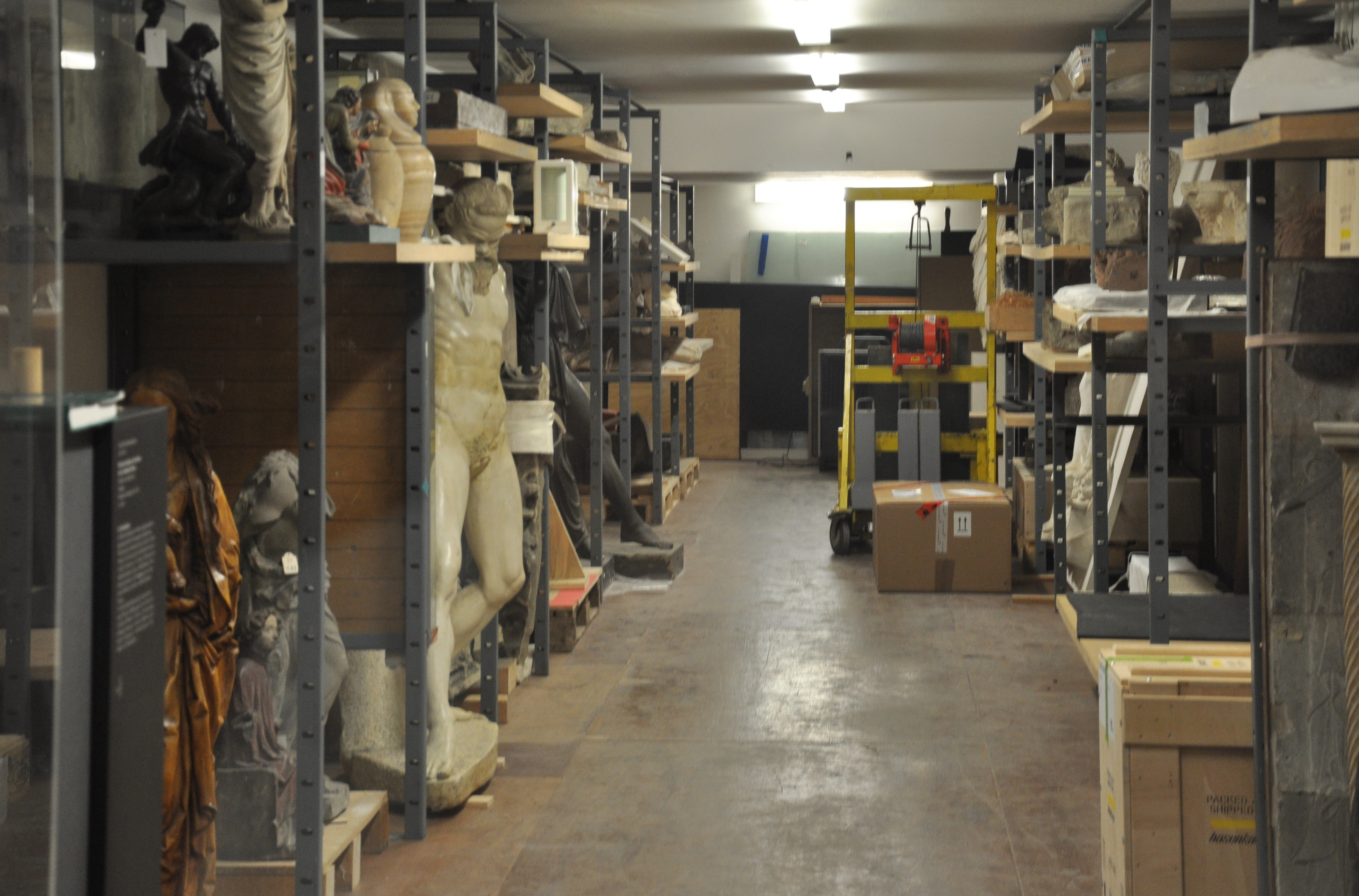 Liebieghaus, Frankfurt am Main; Blick vom Schaudepot in das nicht öffentliche Depot